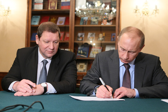 В. В. Путин и С. С. Сидорский подписывают План совместных действий по минимизации последствий финансового кризиса, улучшению параметров платежного баланса, совершенствованию условий ведения предпринимательской деятельности и взаимной торговли